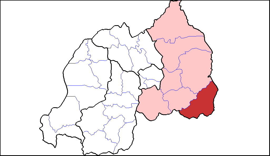 Distretto di Kirehe.